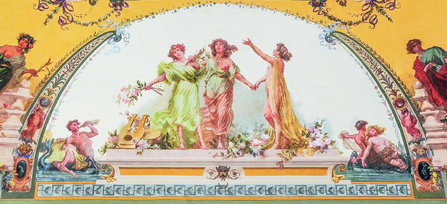 "Allegoria del canto", affresco, Palazzo Cesaroni, Perugia